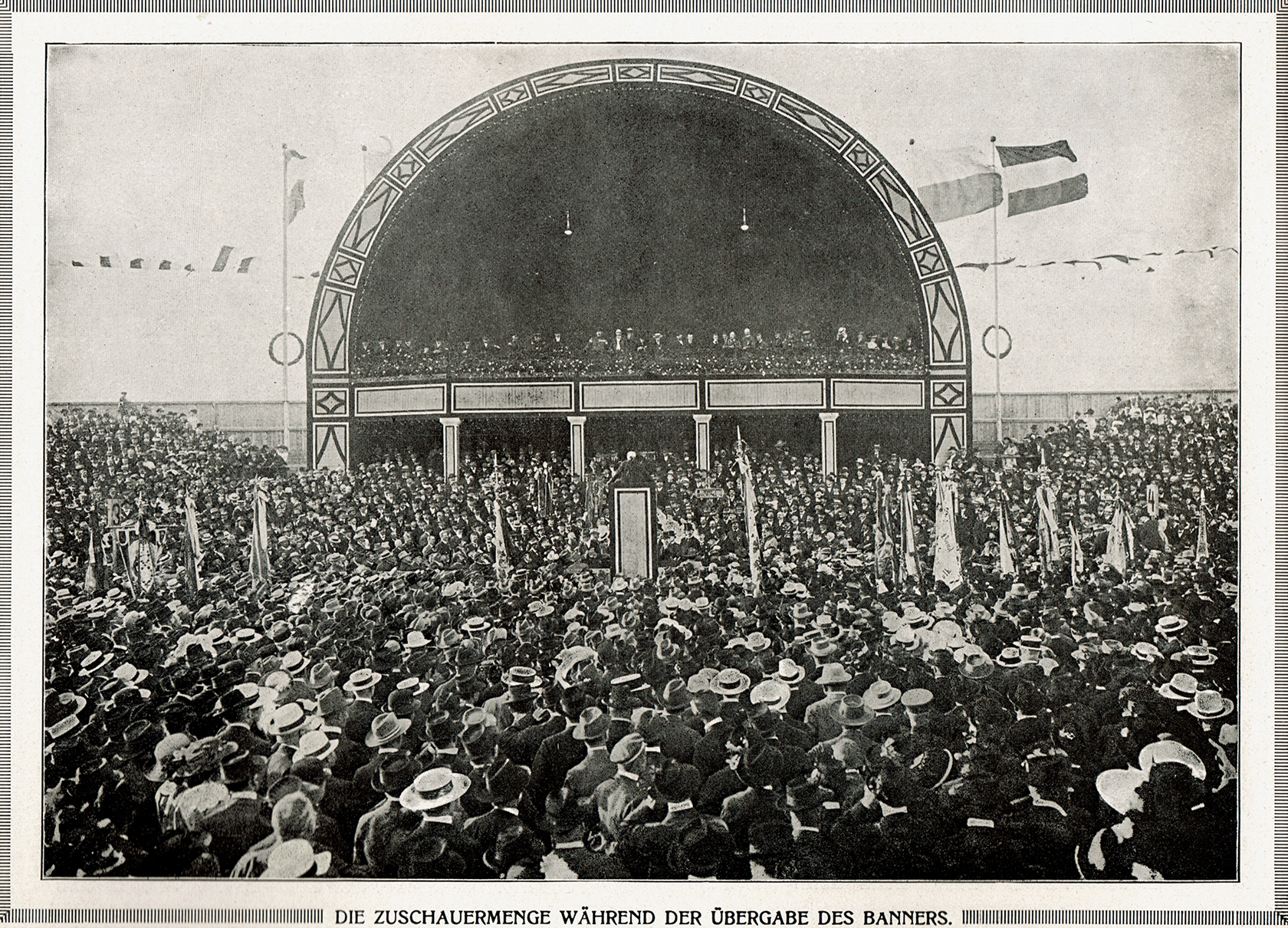 Deutsches Turnfest 1913 in Leipzig, Bannerübergabe